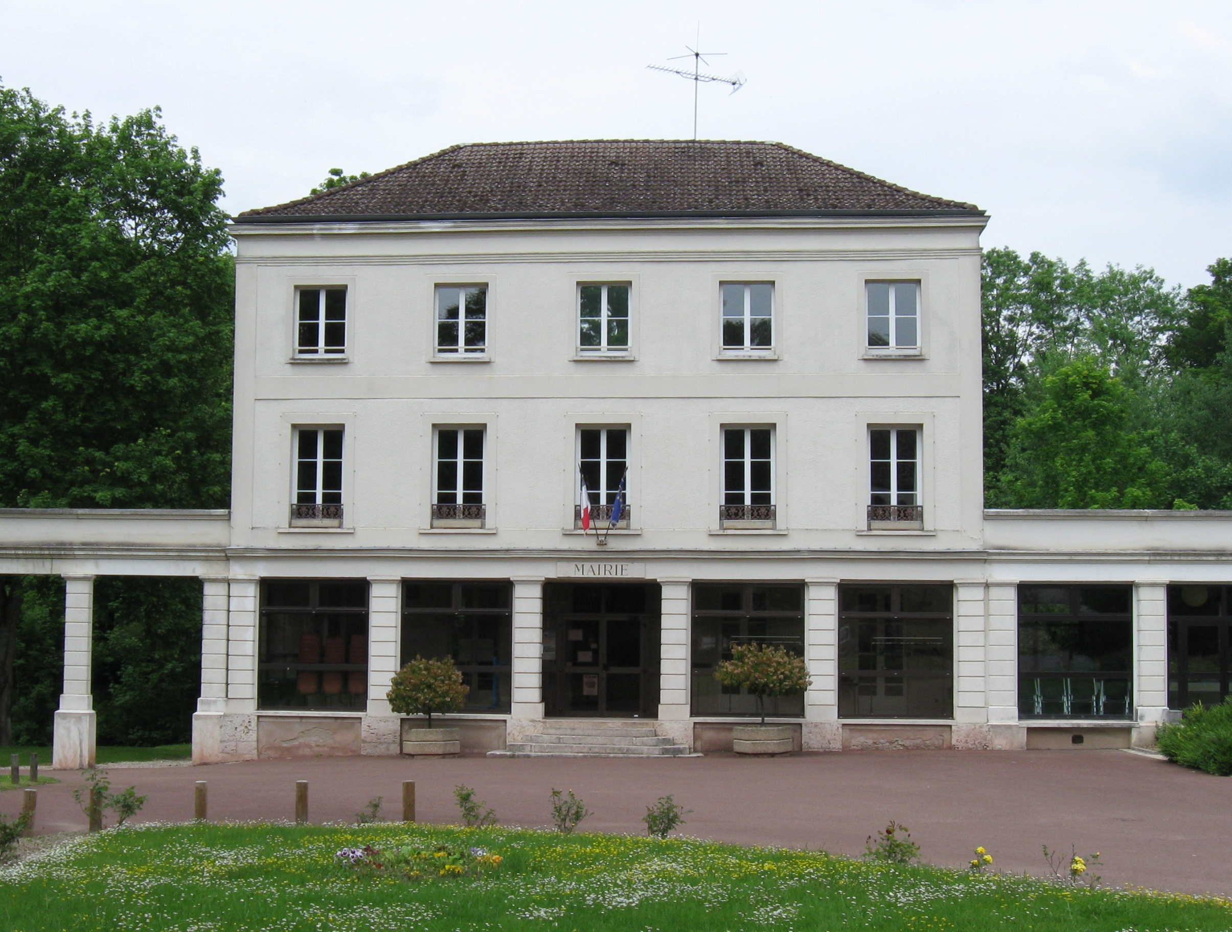 Mairie de Saint-Brice. (Seine-et-Marne, région Île-de-France).